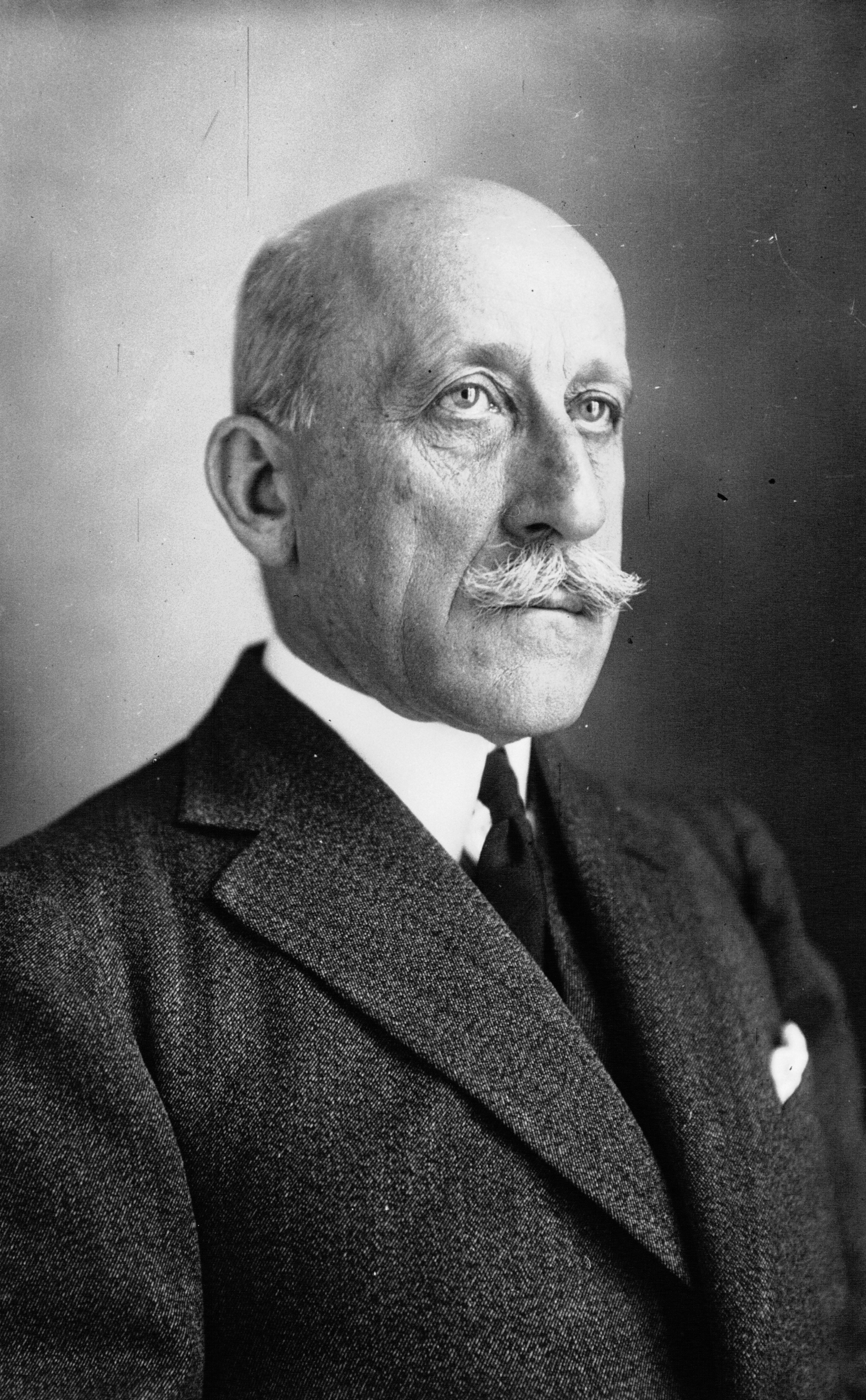 Comte d'Andlon Hambourg [sic], sénateur (Bas-Rhin) : photographie de presse